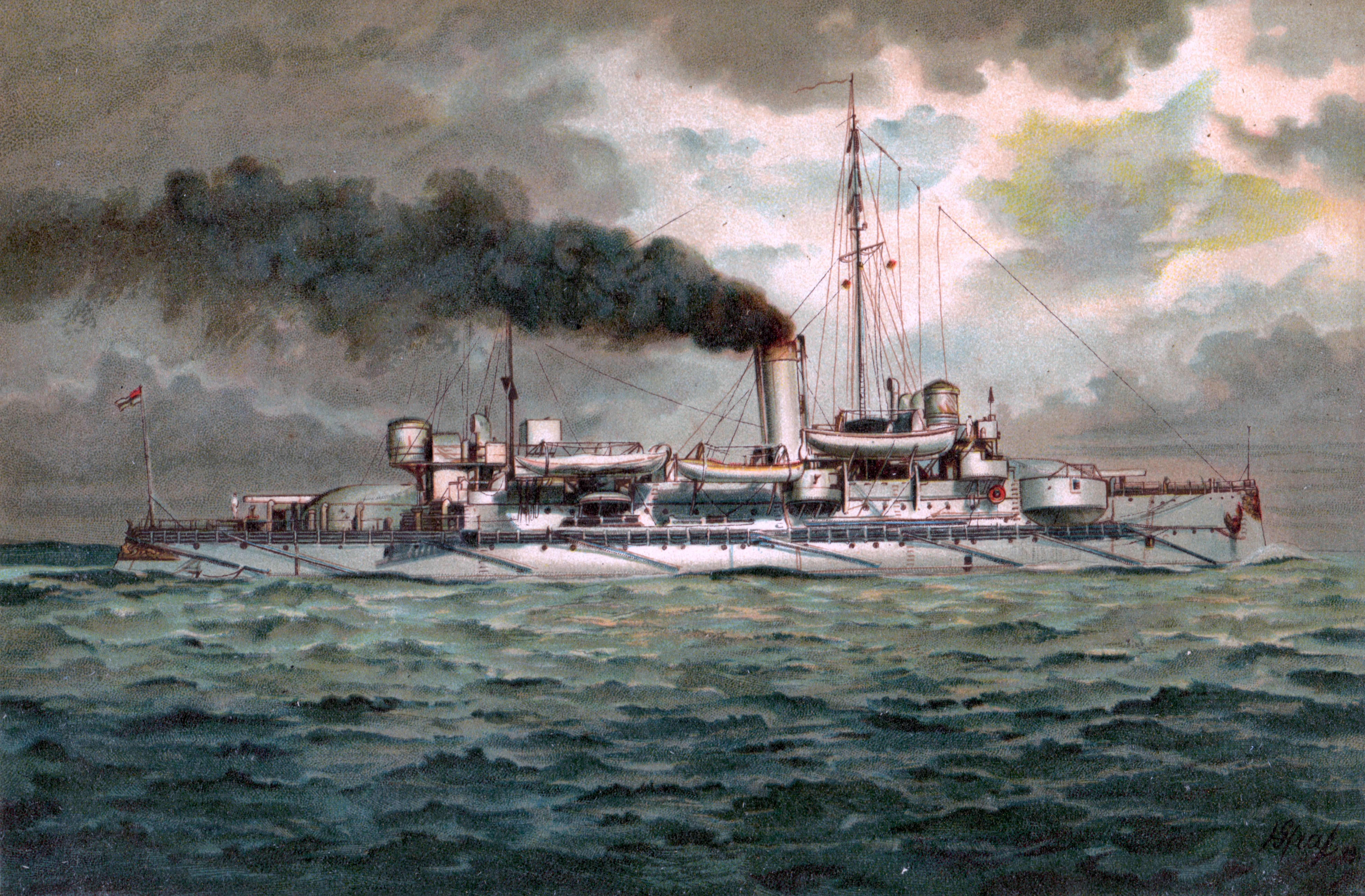 S.M. Küstenpanzerschiff Heimdall